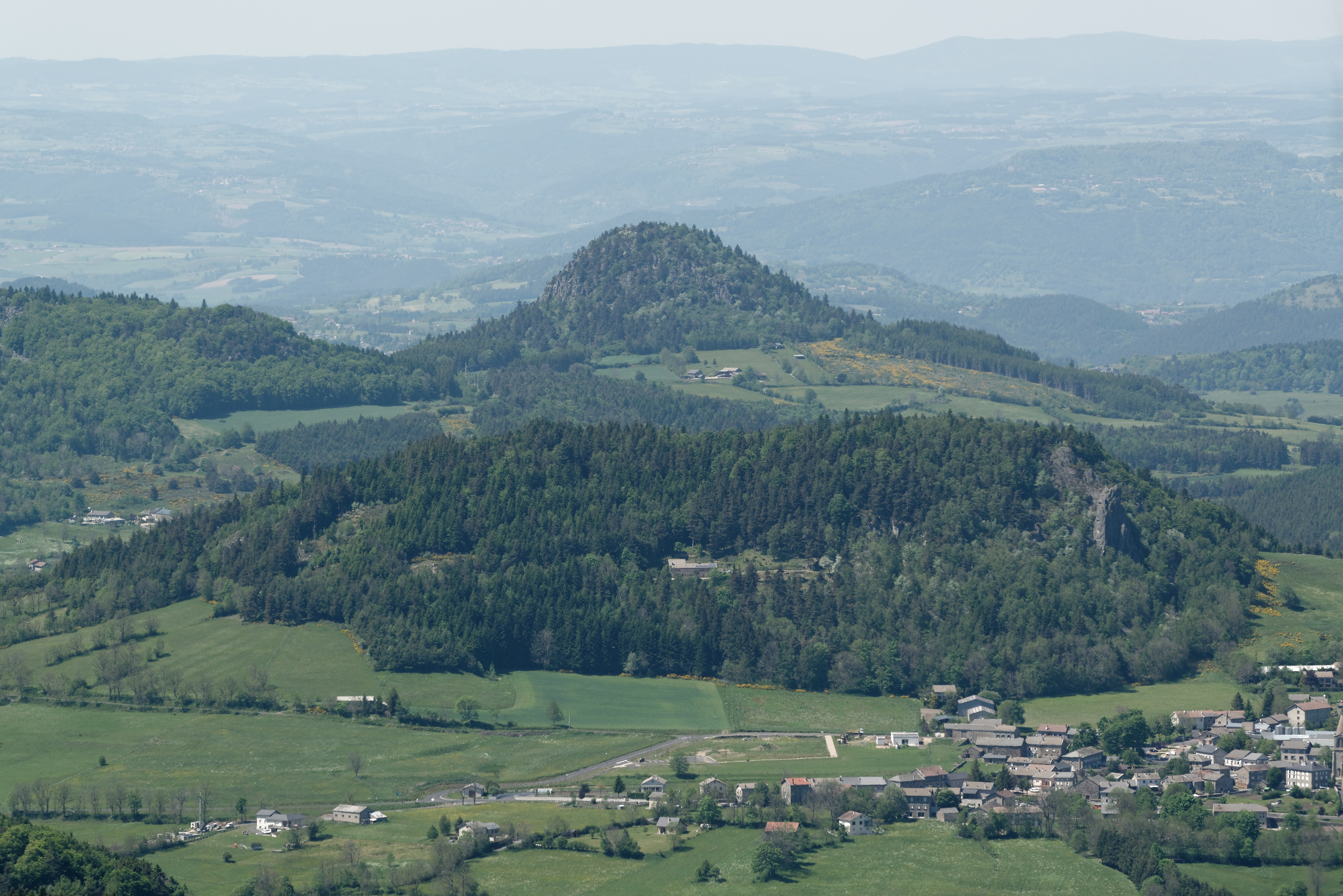 Le suc d'Achon (alt. 1151 m) vu depuis le sommet du pic du Lizieux à Araules, en Haute-Loire.